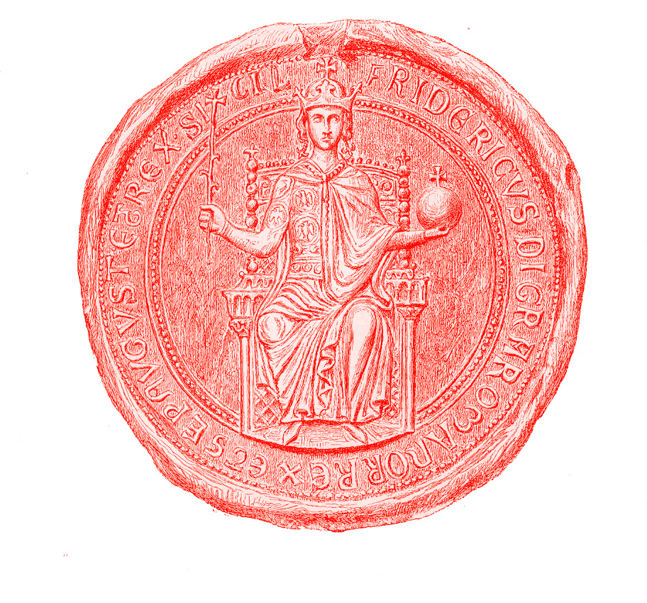 Kaisersiegel Friedrichs II.